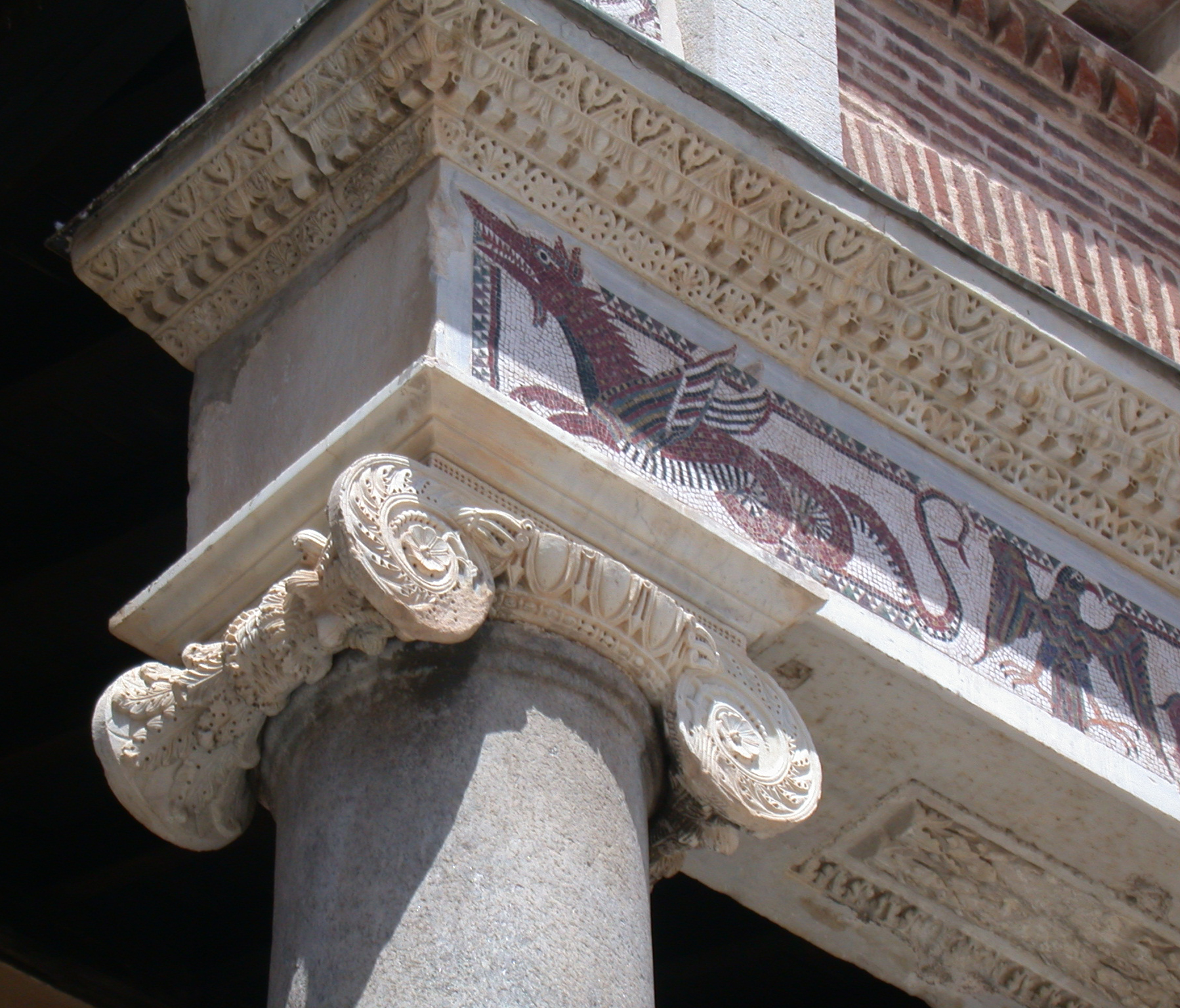 Terracina (provincia di Latina, Lazio, Italia), città alta, Duomo di San Cesareo, particolare della facciata (capitello e trabeazione del portico).